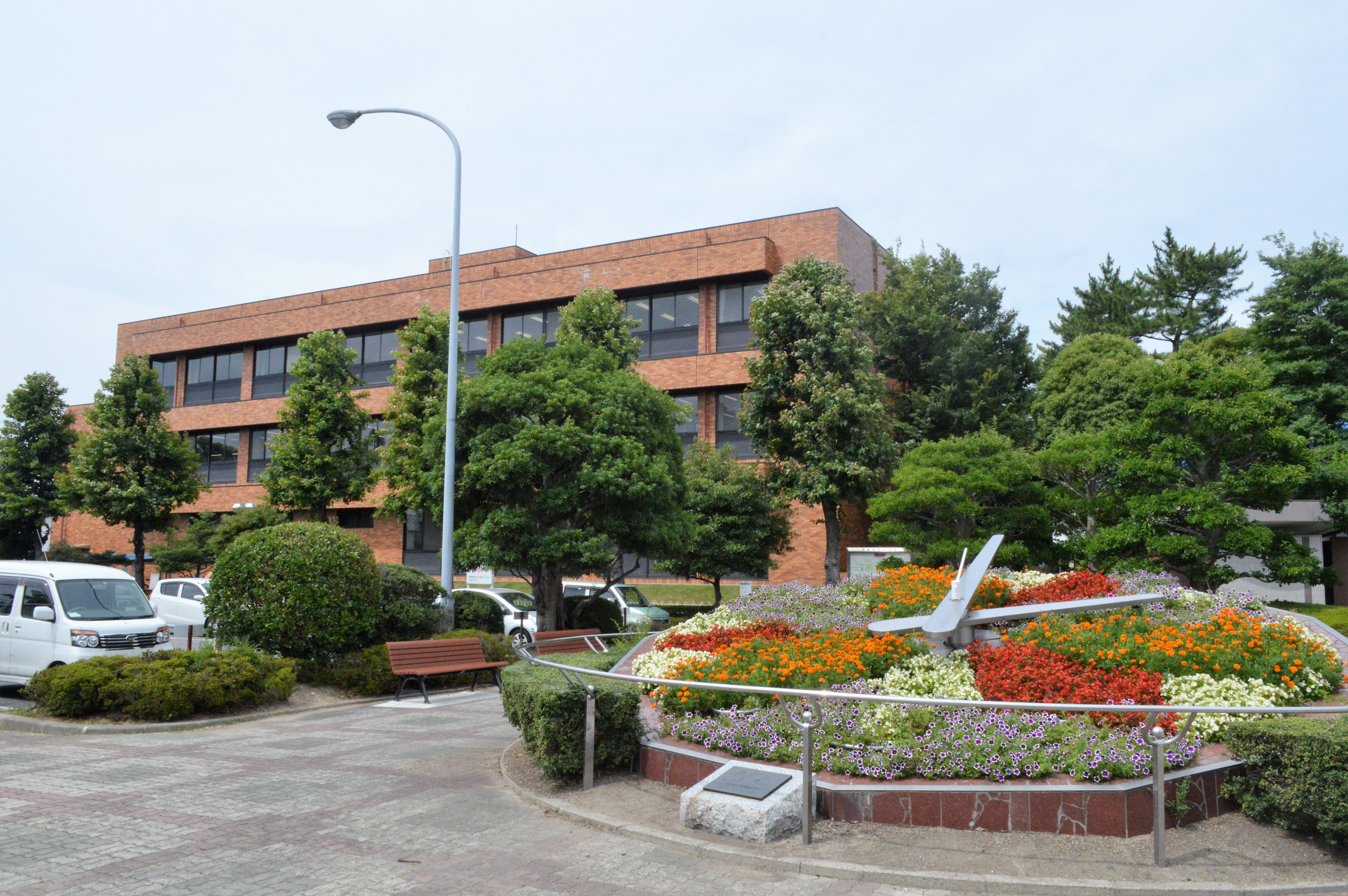 愛知県西尾市の西尾市立図書館。